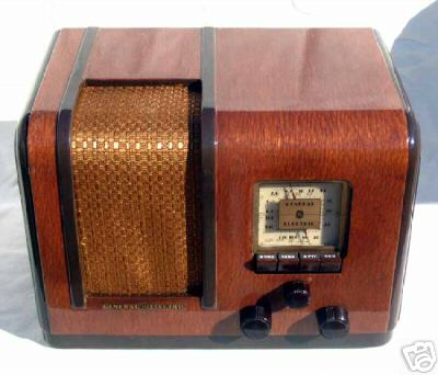 RÃ¡dio GE "Aero" -1936 Fotografia tirada por ClÃ¡udio de Castro. DomÃ­nio PÃºblico.